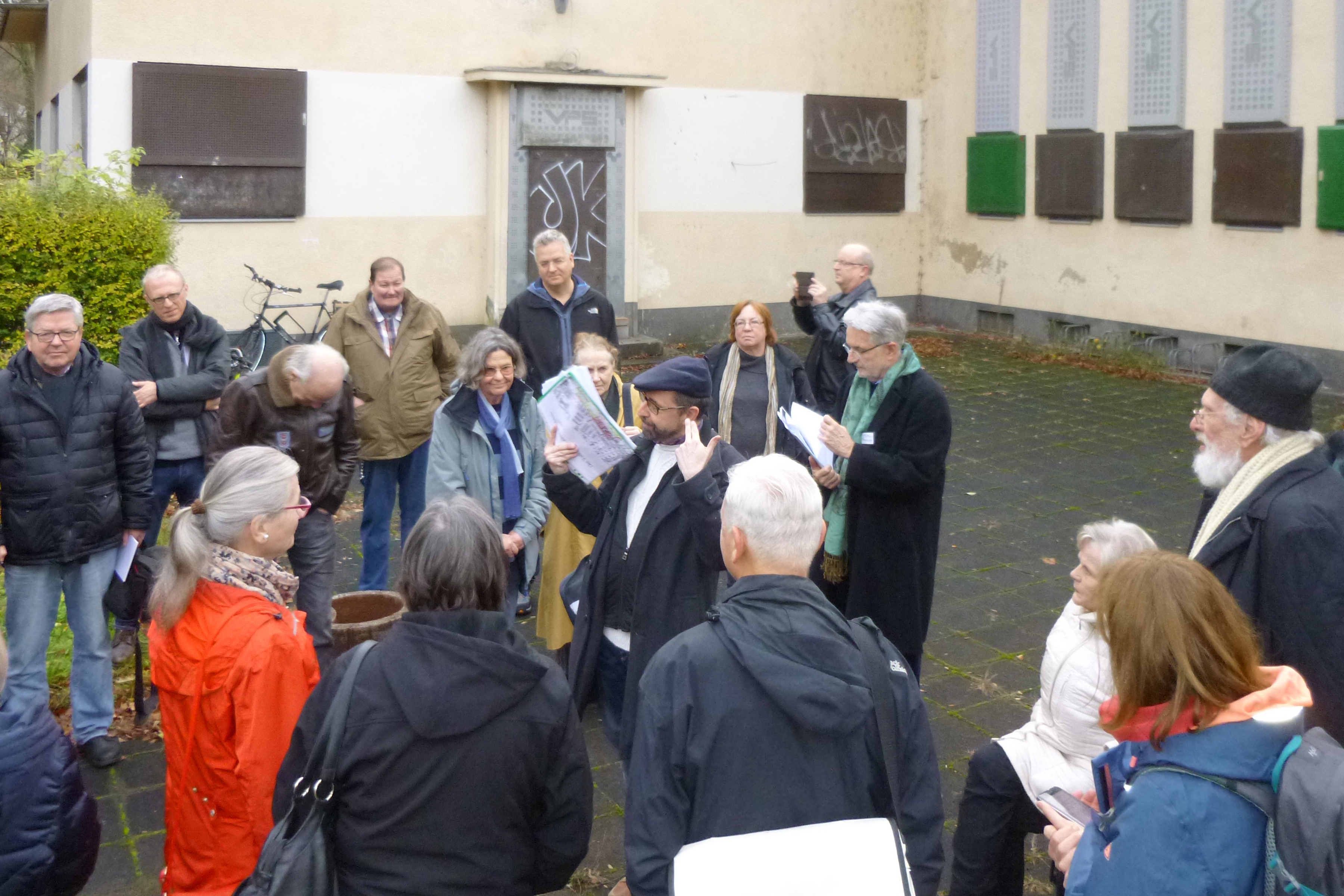 Ehemaliges Funkhaus der WERAG (Vorläufergesellschaft des WDR), Köln-Raderthal Hitzelerstraße 125, Englische Siedlung; Vorstellung als „Denkmal des Monats“ durch den Rheinischen Verein für Denkmalpflege und Landschaftsschutz This is a photograph of an architectural monument.